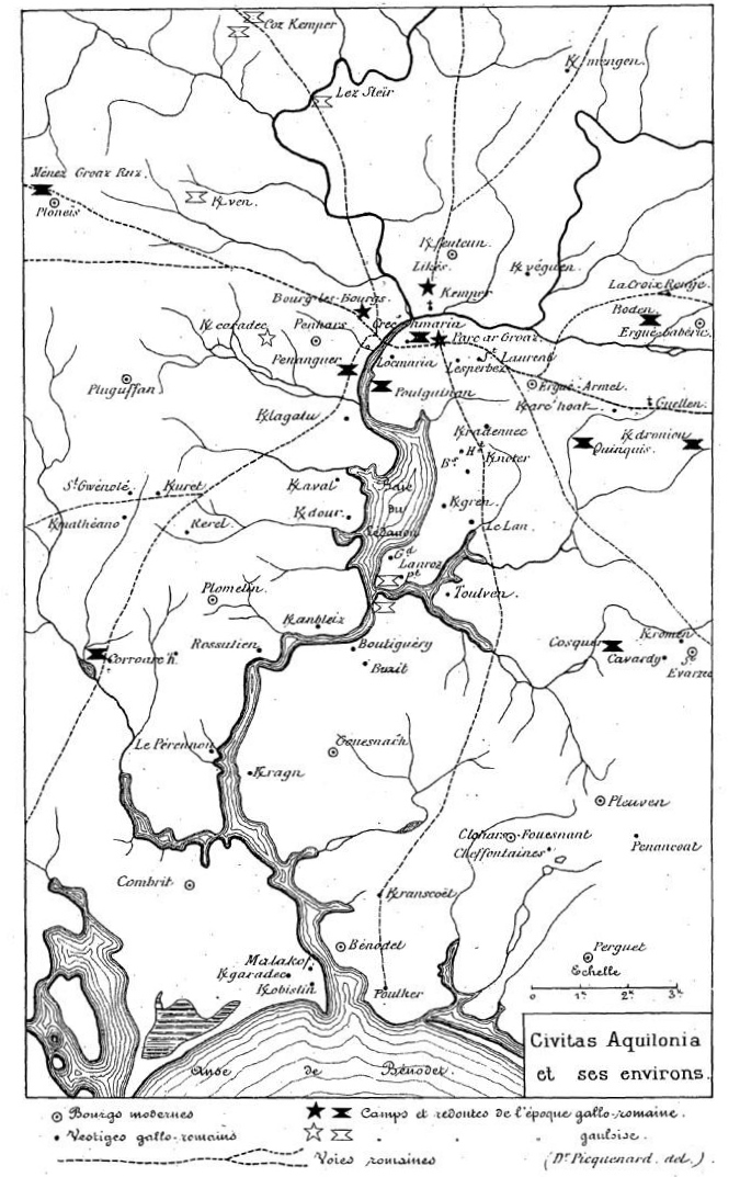 Carte des implantations romaines à Civitas Aquilonia (Quimper) et ses environs